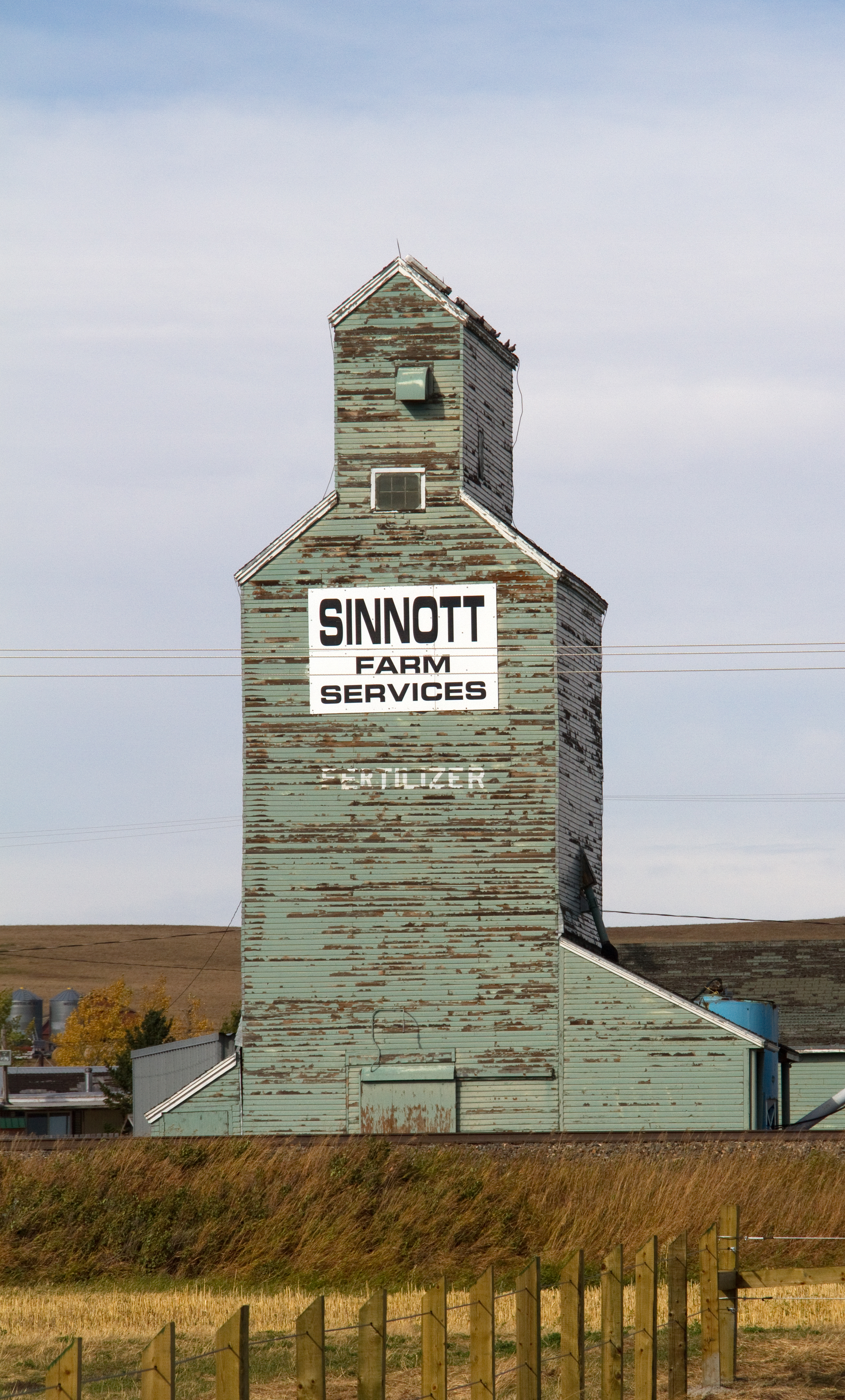 Grain Elevator